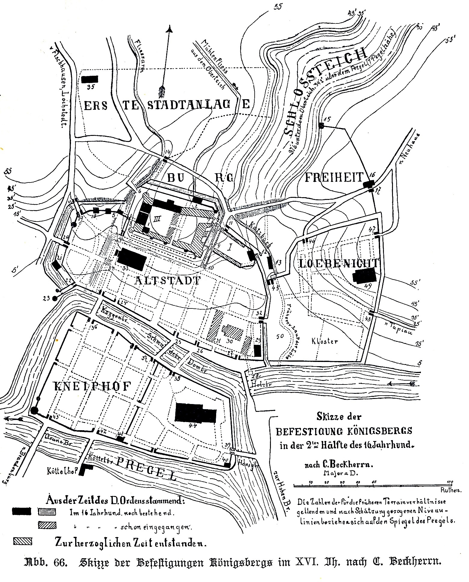 Königsberg, Skizze der Befestigungen im 16. Jahrhundert nach Carl Beckherrn